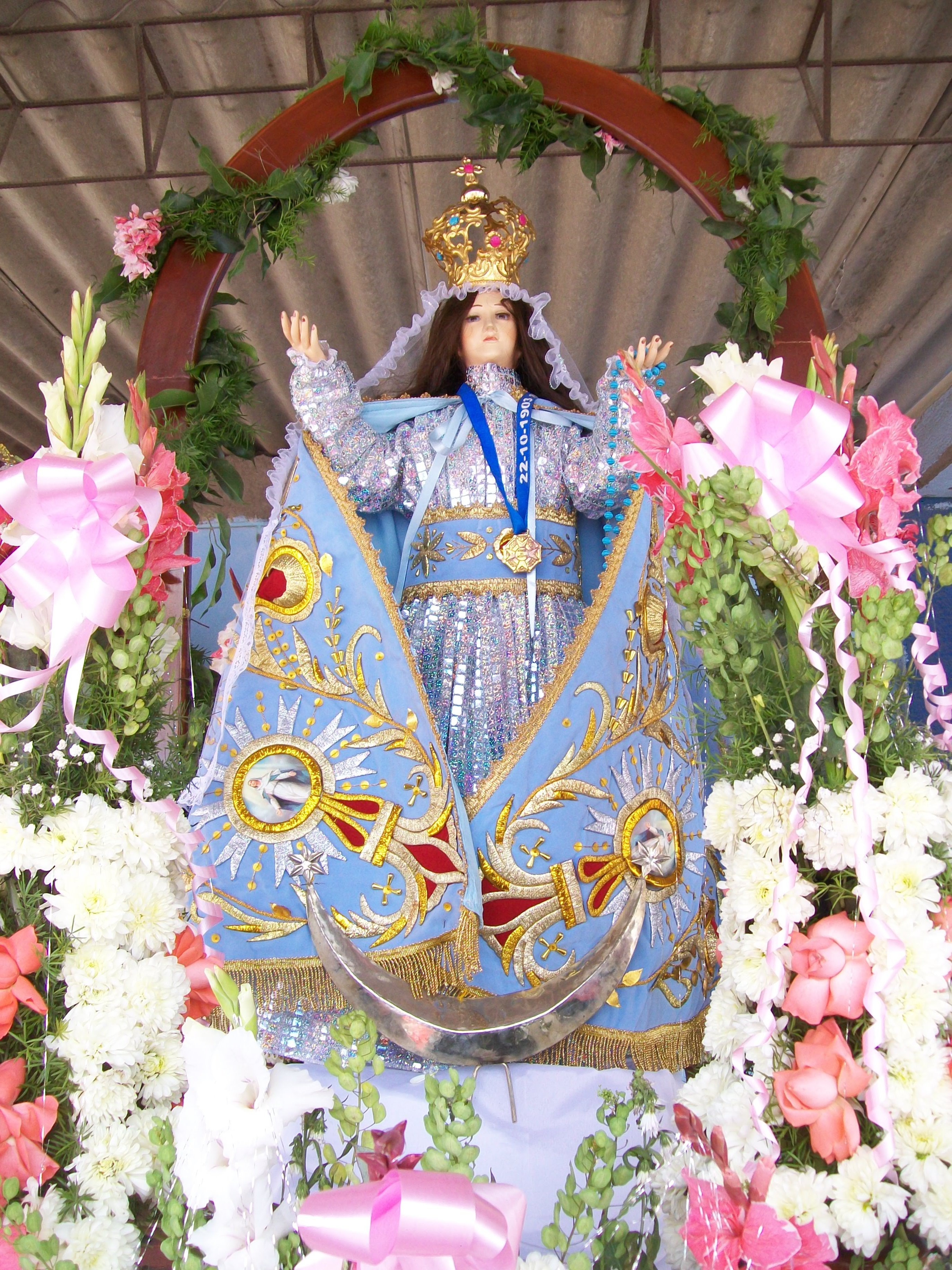 Fiesta Patronal Nombre: Virgen de Asunción de San Pedro de Copa País: Perú Fotógrafo:© Edgar Amador Espinoza Montesinos